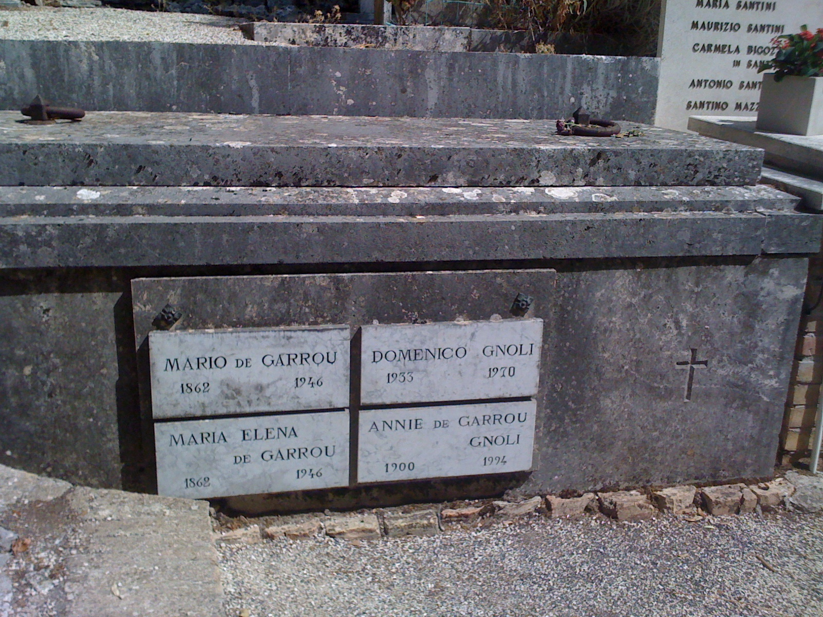 A Monteluco di Spoleto è sepolto un illustre pittore, scenografo e illustratore italiano Domenico Gnoli, insieme a sua madre Annie de Garrou.